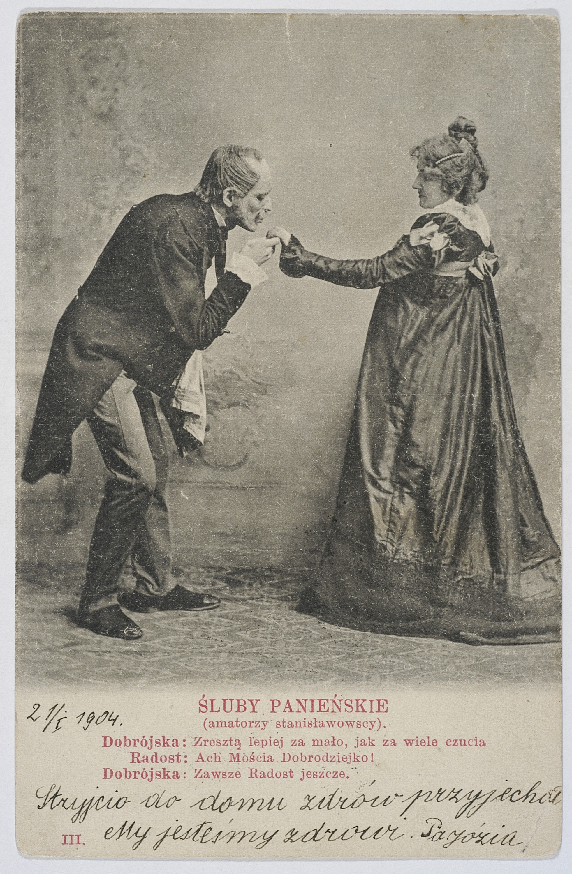 Fotografia Józefa Edera - inscenizacja dramatu "Śluby panieńskie" A. Fredry - aktorzy teatru amatorskiego w Stanisławowie, pocztówka wydana ok 1904 r.